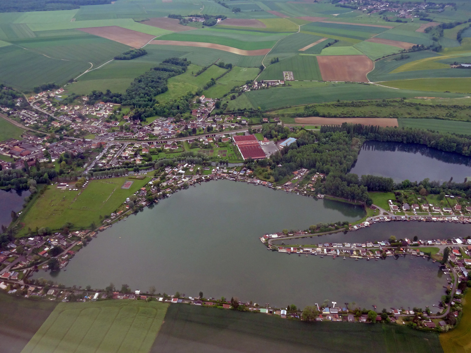 Vue aérienne des étangs de Milly-sur-Thérain (Oise), France.